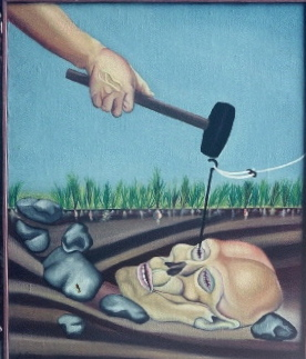 Campeggio in Italia olio su tela